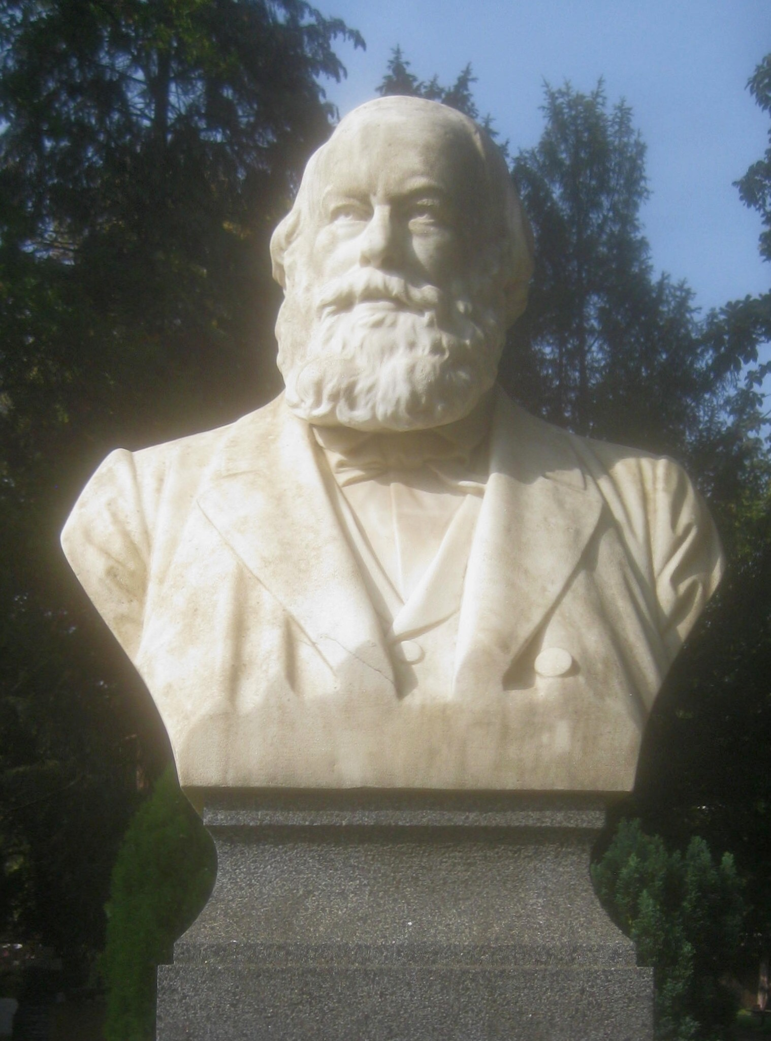 Büste von Immanuel Faißt, Grabmal auf dem Pragfriedhof in Stuttgart, Abteilung 6.